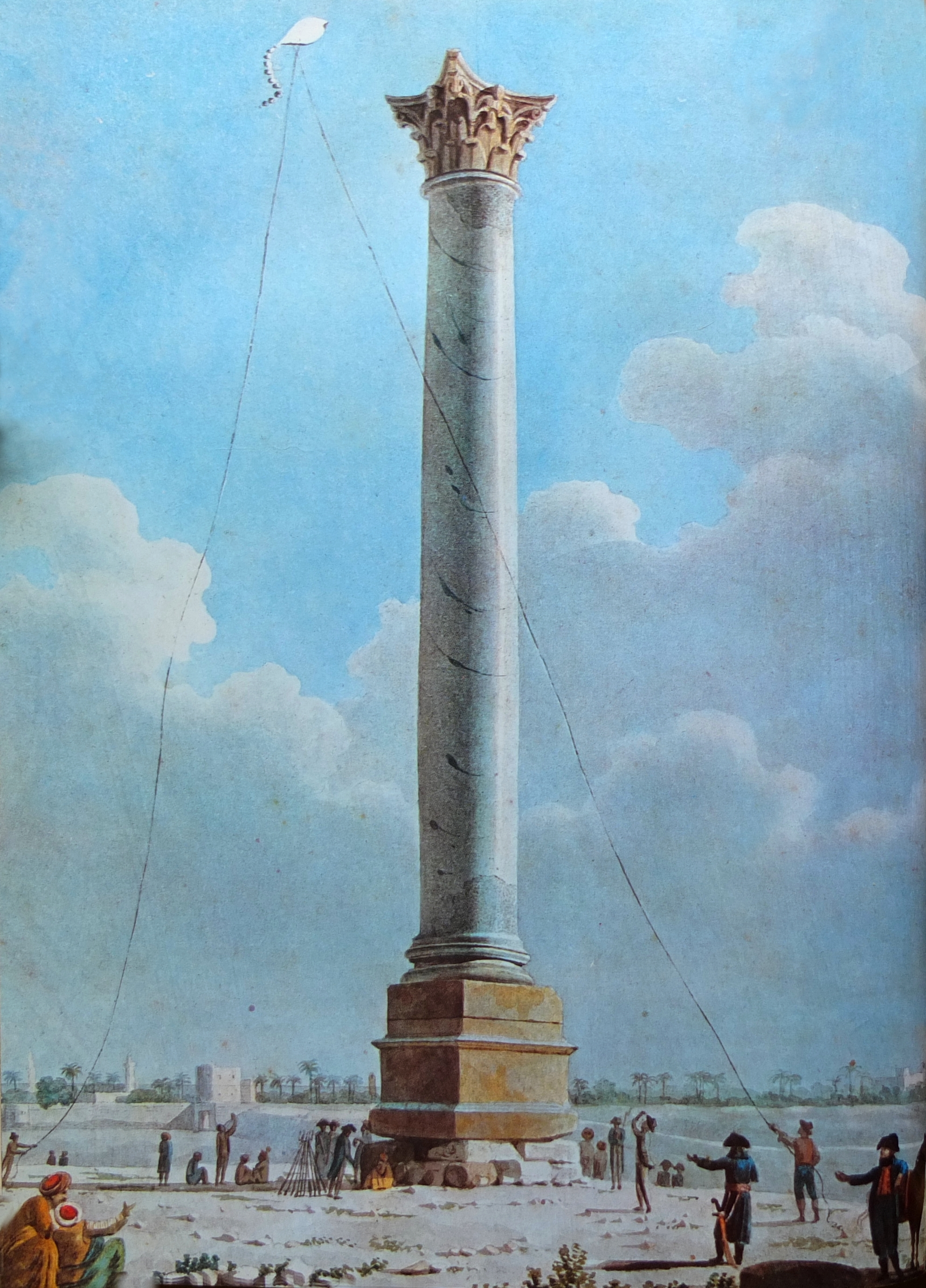 Le Pilier de Pompée, aquarelle de Dominique Vivant Denon. Date et lieu de conservation non précisé. A droite, avec un sabre Bonaparte venant d'arriver à Alexaandrie, le cerf-volant sert à mesurer la hauteur de la colonne.